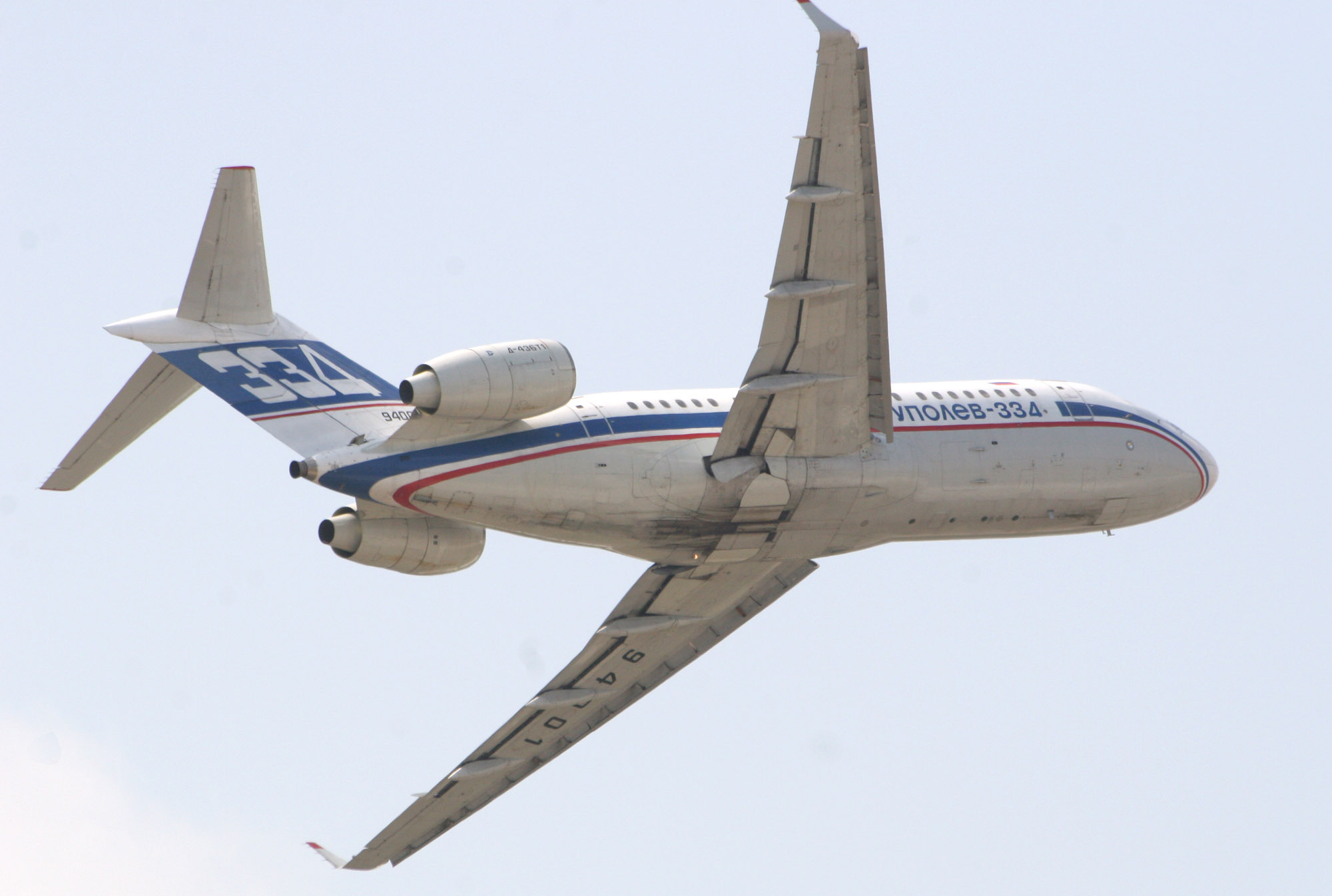 Самолёт Ту 334. Демонстрационный полёт на МАКС-2007